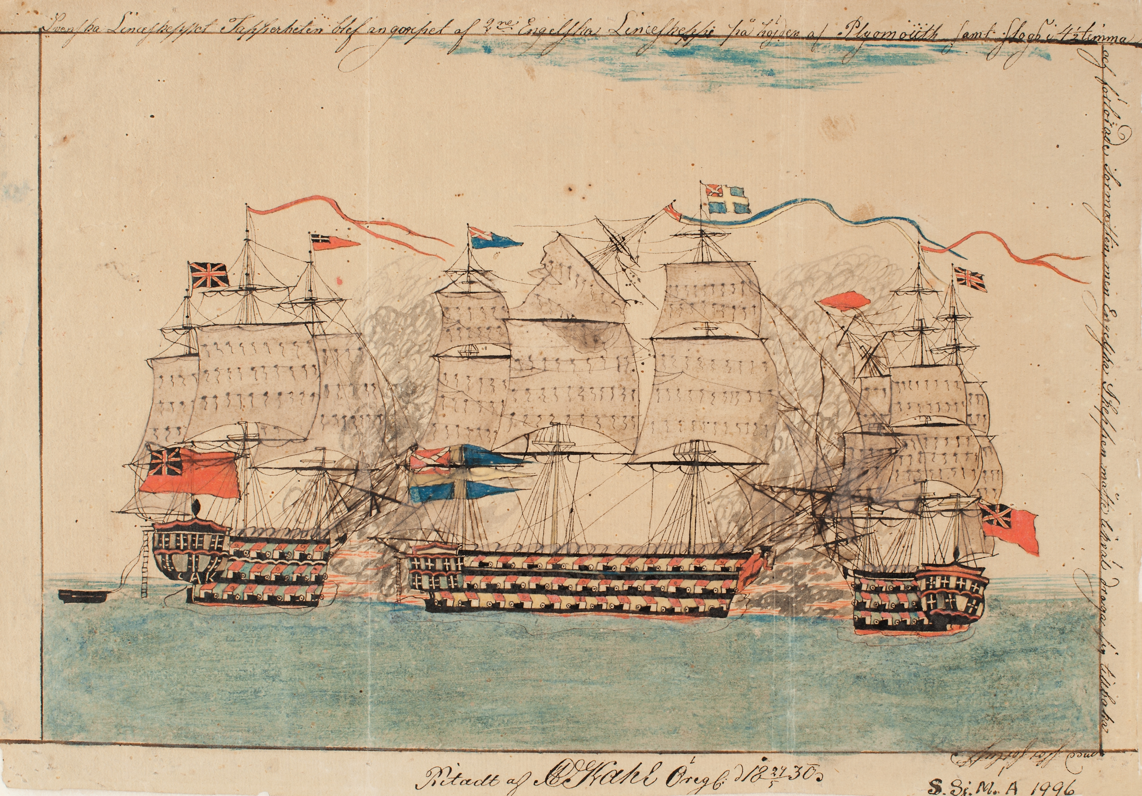 Svenska linjeskeppet Tapperheten blir angripet av två engelska linjeskepp på höjden av Plymouth. Ritad den 24 maj 1830 av A.C. Kahl.